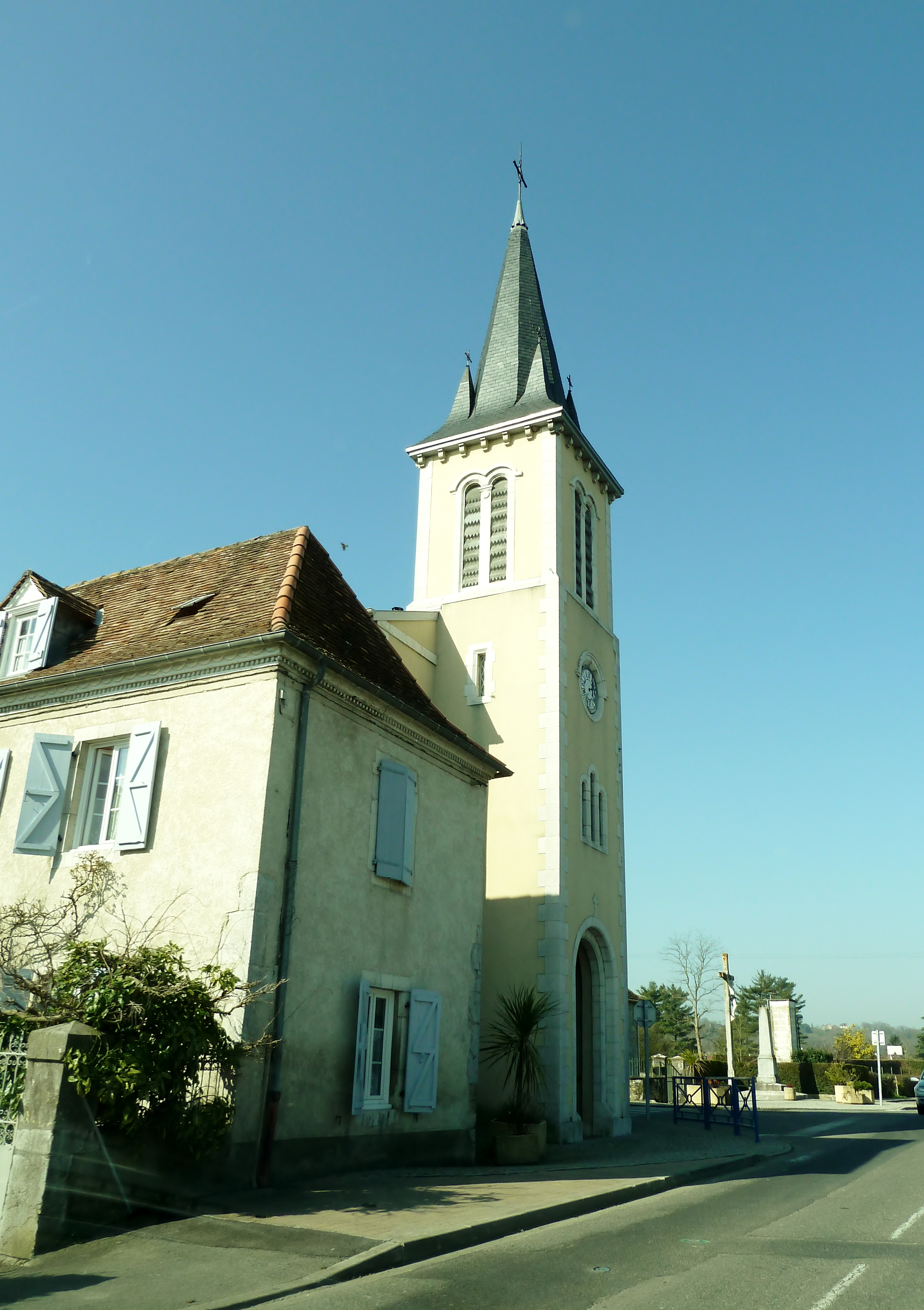 Église de Biron (Pyrénées-Atlantiques)